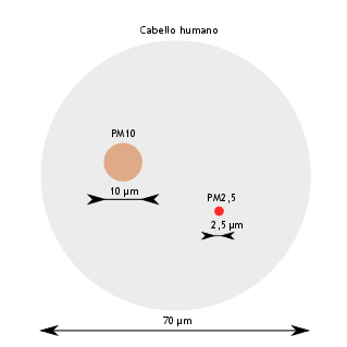 Tamaño de las partículas PM10 y PM2,5 comparado con la sección de un cabello humano.